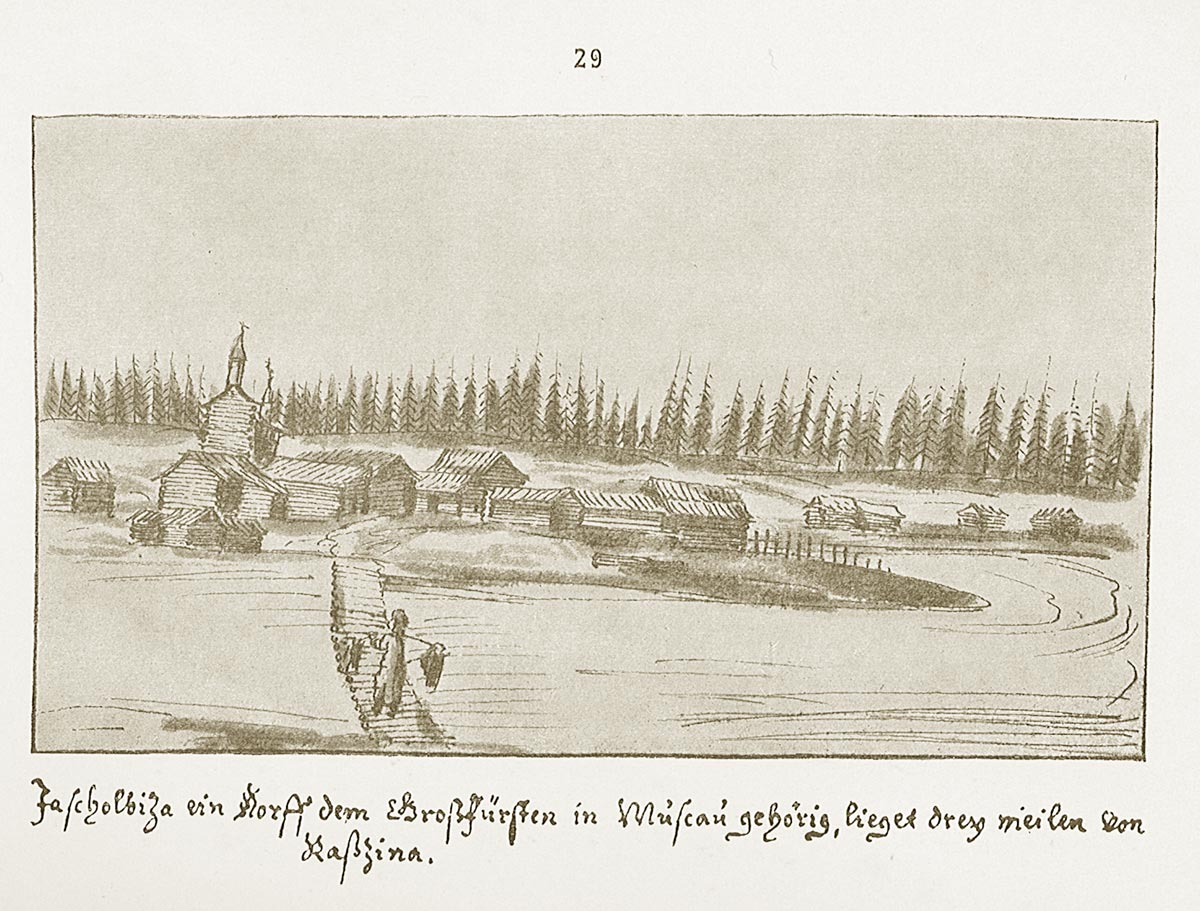 Яжелбицы